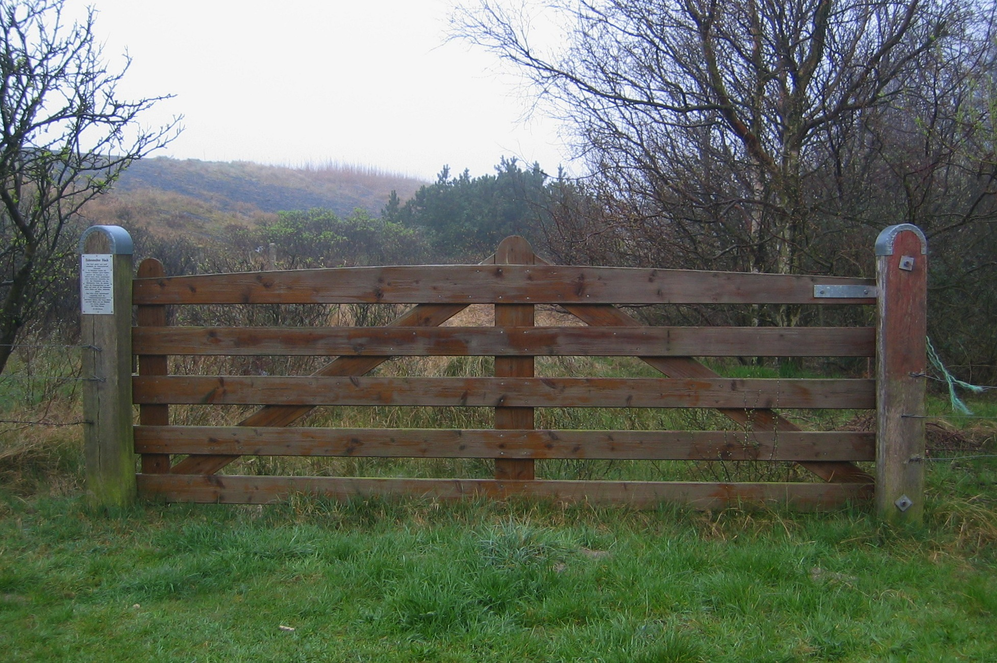 „Eiderstedter Heck“ in den Dünen bei Sankt Peter-Ording, Dorf. – Auf Eiderstedt werden die Fennen (Wiesen) durch Gräben getrennt, die Eingänge zu den Fennen durch Hecks (Tore) verschlossen, die historisch auch als Eingangspforten zu den Höfen dienten und das Bild der Kulturlandschaft prägten. In Eiderstedt überwiegen zwei verschiedene Heckformen, das Dithmarscher und das Eiderstedter Heck. Das abgebildete Heck wurde von der „AG Orts-Chronik“ St. Peter erstellt.